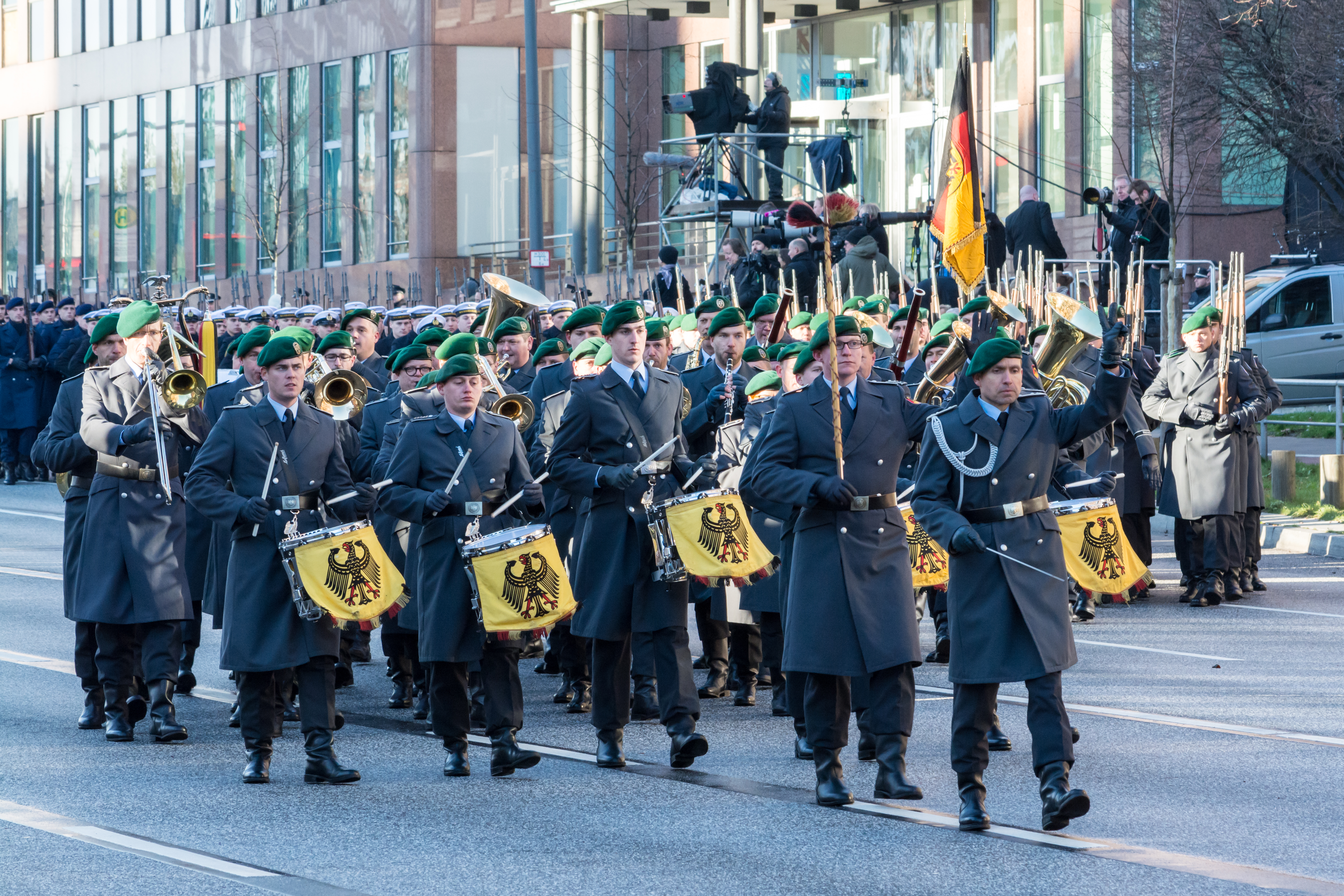 Soldaten des Stabsmusikkorps und des Wachbataillons der Bundeswehr auf der Ludwig-Erhard-Straße in Hamburg-Neustadt beim Abmarsch nach dem Großen Ehrengeleit im Rahmen des Staatsakts für Helmut Schmidt.